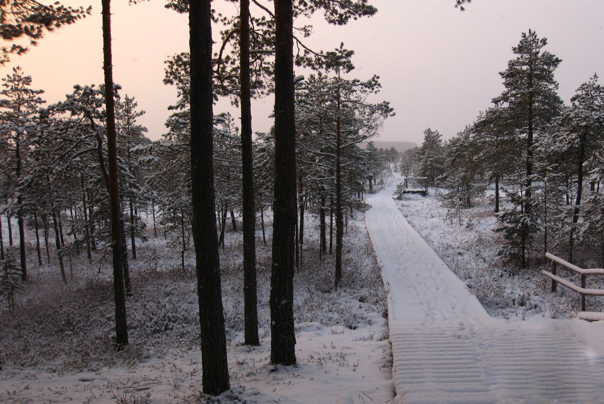 Meenikunno raba laudtee idapoolne algus